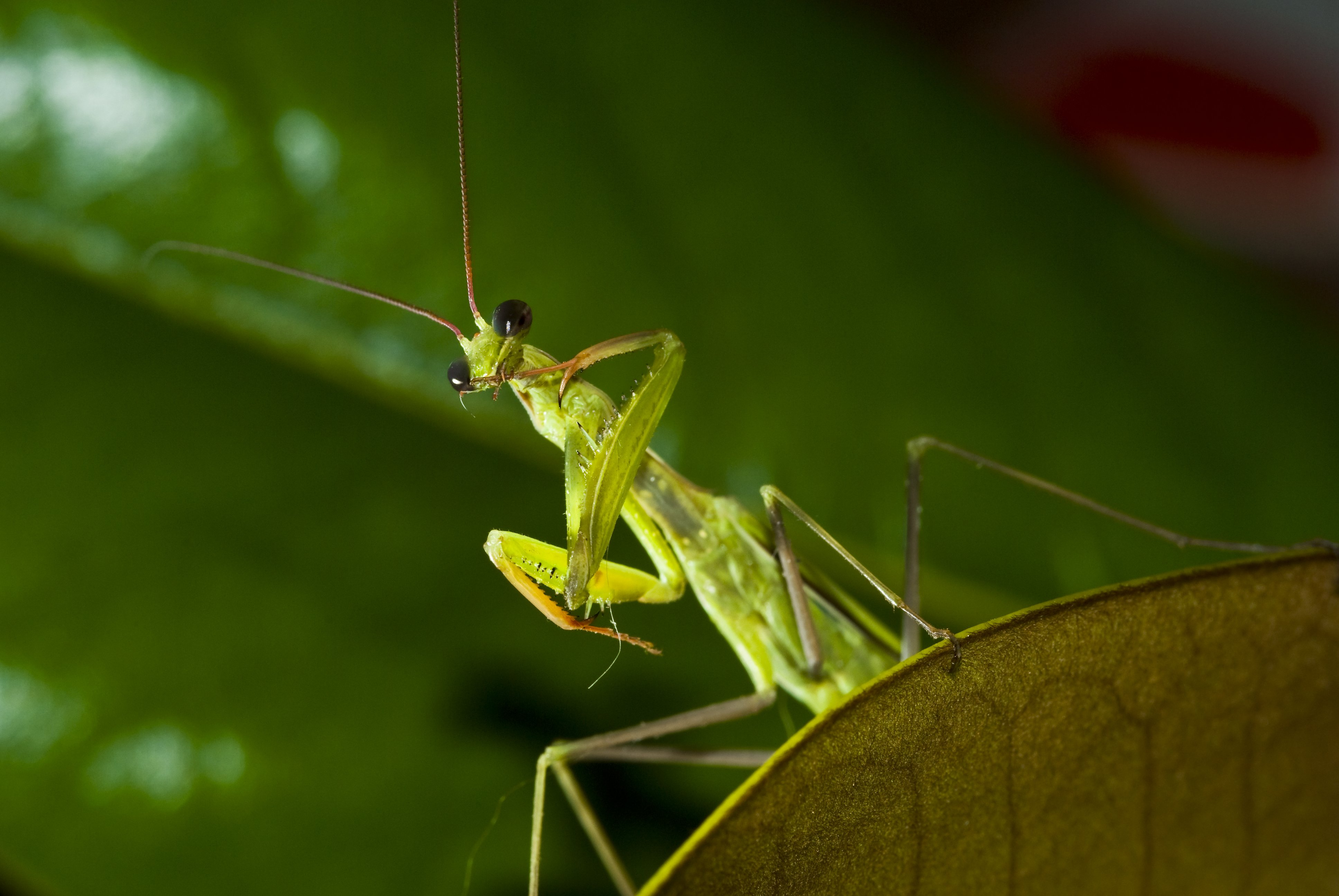 Mantide religiosa ( Mantis religiosa) ripresa con Sigma 105 macro su Pentax k10d, illuminazione flash.